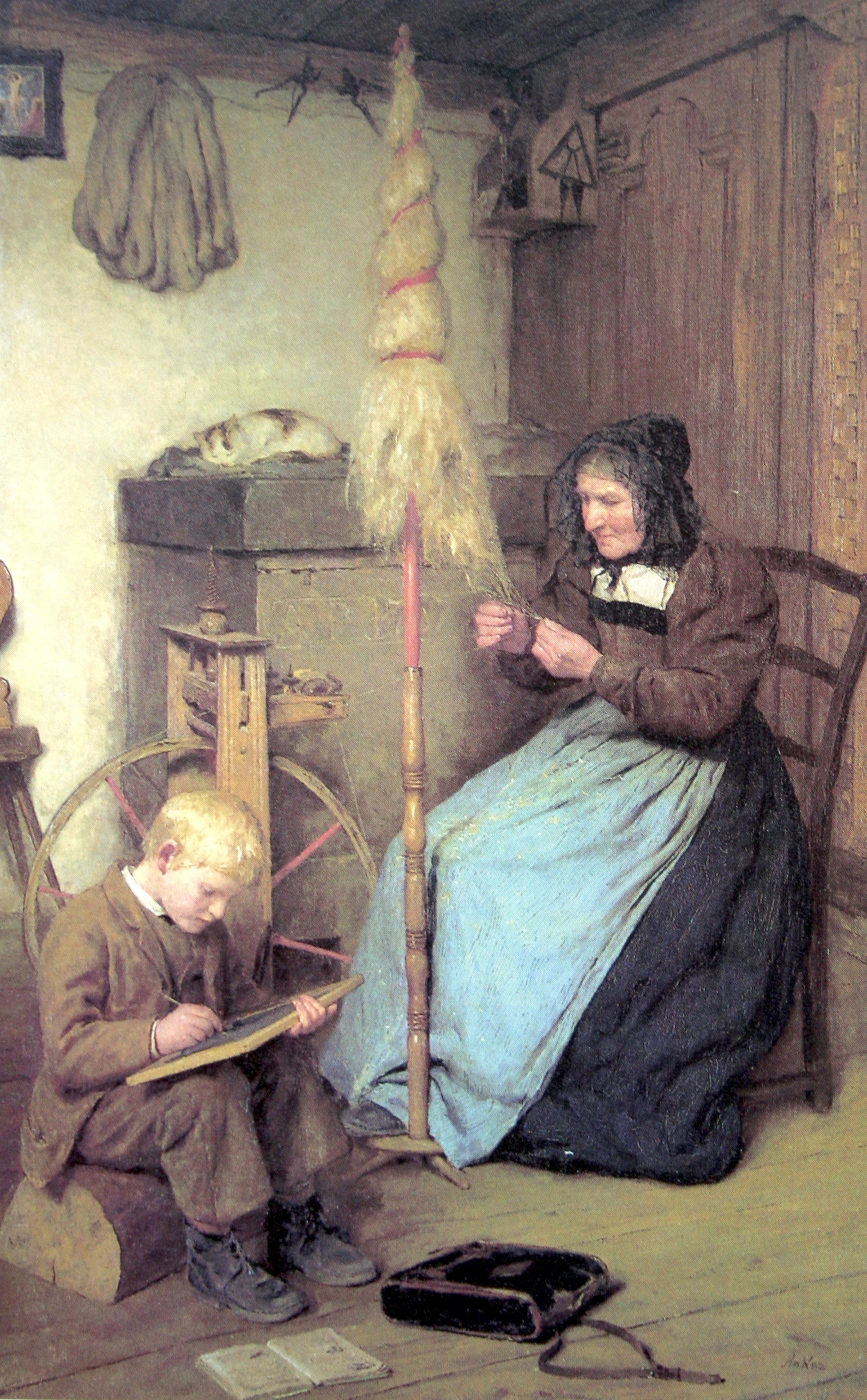 Die Arbeitsamen, Gemälde von Albert Anker, 1883, 86 x 55.5 cm, Privatbesitz